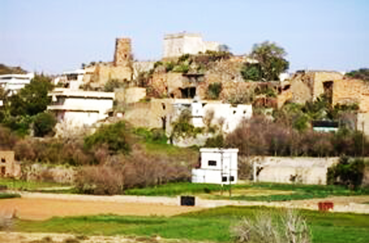 بلاد قبيلة حوالة